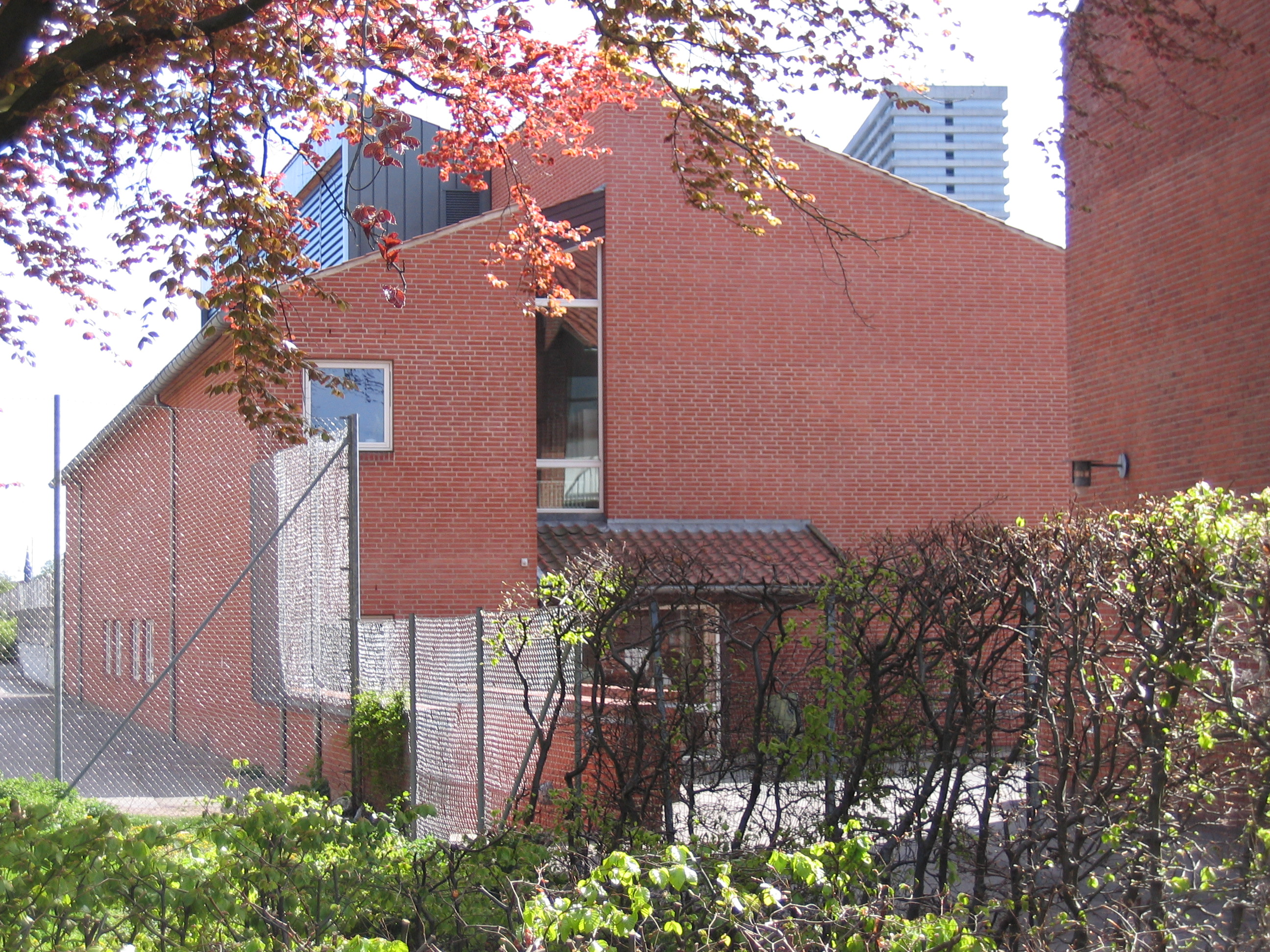 Johannesskolen